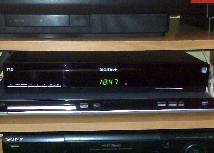 Este es el nuevo descodificador de Canal Plus, que aún no ha salido al mercado, con función DVR, TDT y disco duro incorporado. Es foto de móvil, siento la mala calidad...